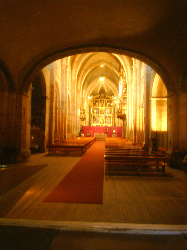 Nave de la Iglesia del Monasterio de Fitero Navarra España